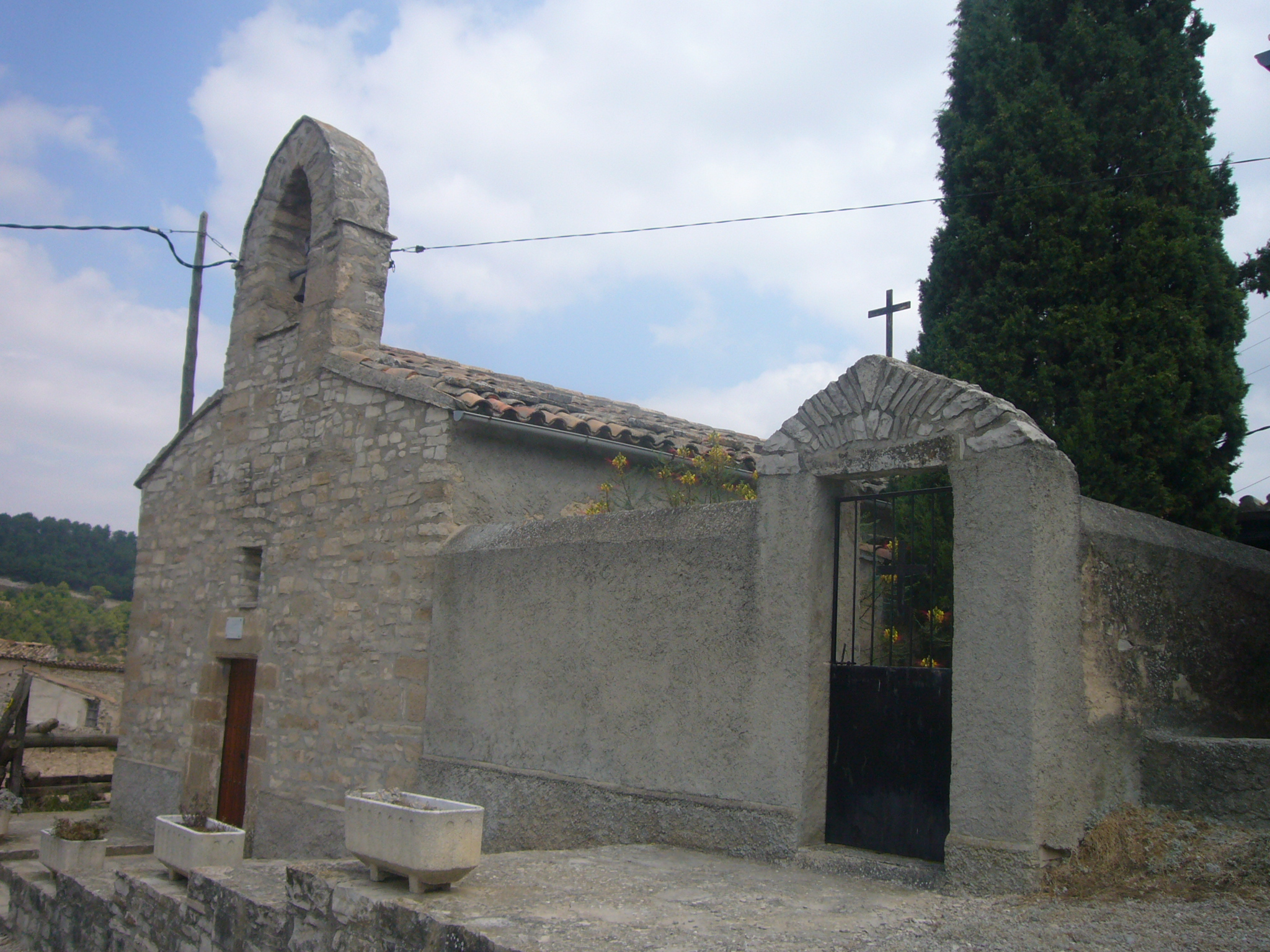 Església o capella de Sant Jaume, situada a Rocamora d'Argençola (restaurada el 1991 amb Antoni Deig com a bisbe)